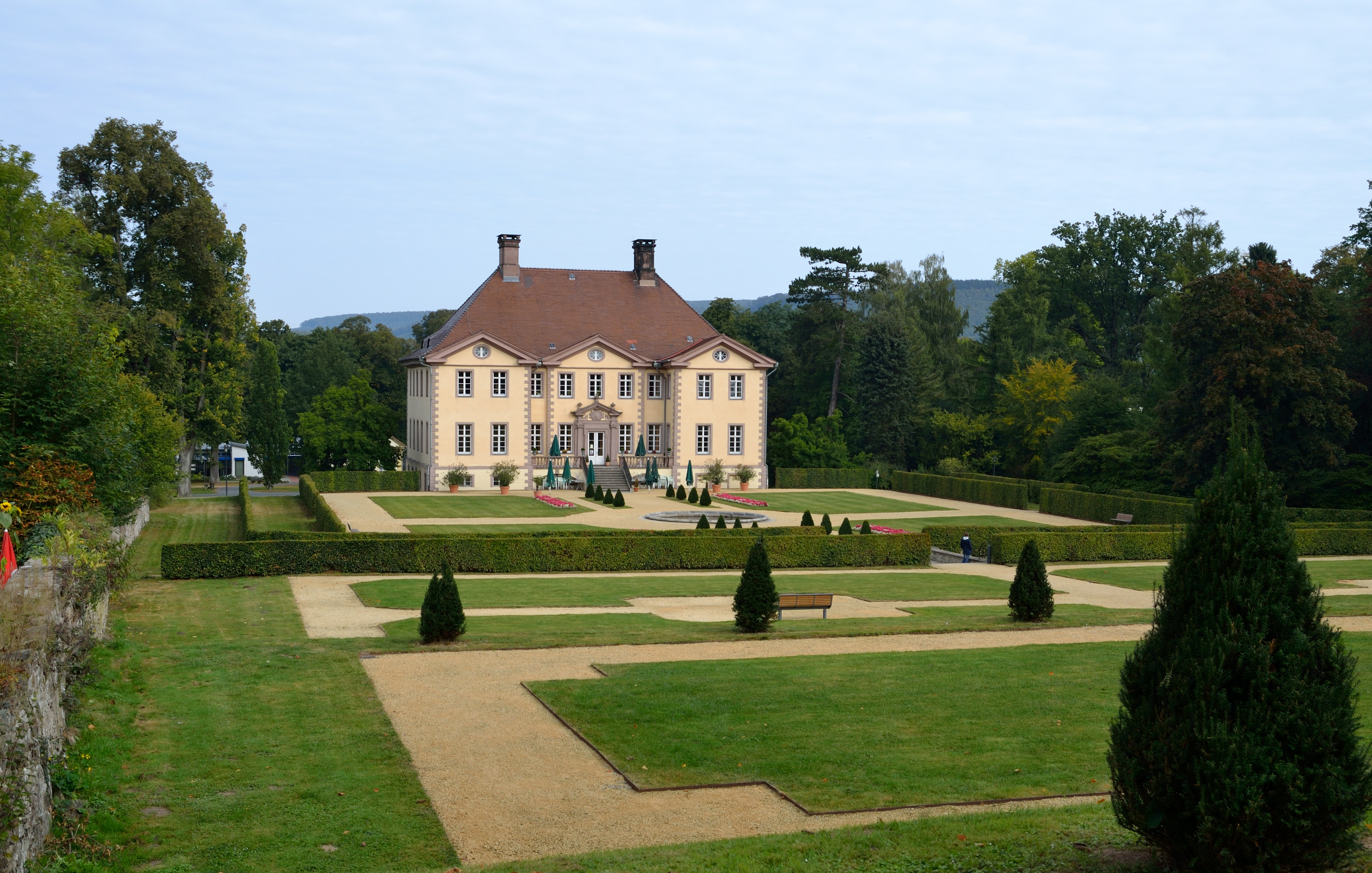 This is a photograph of an architectural monument. Schlosspark